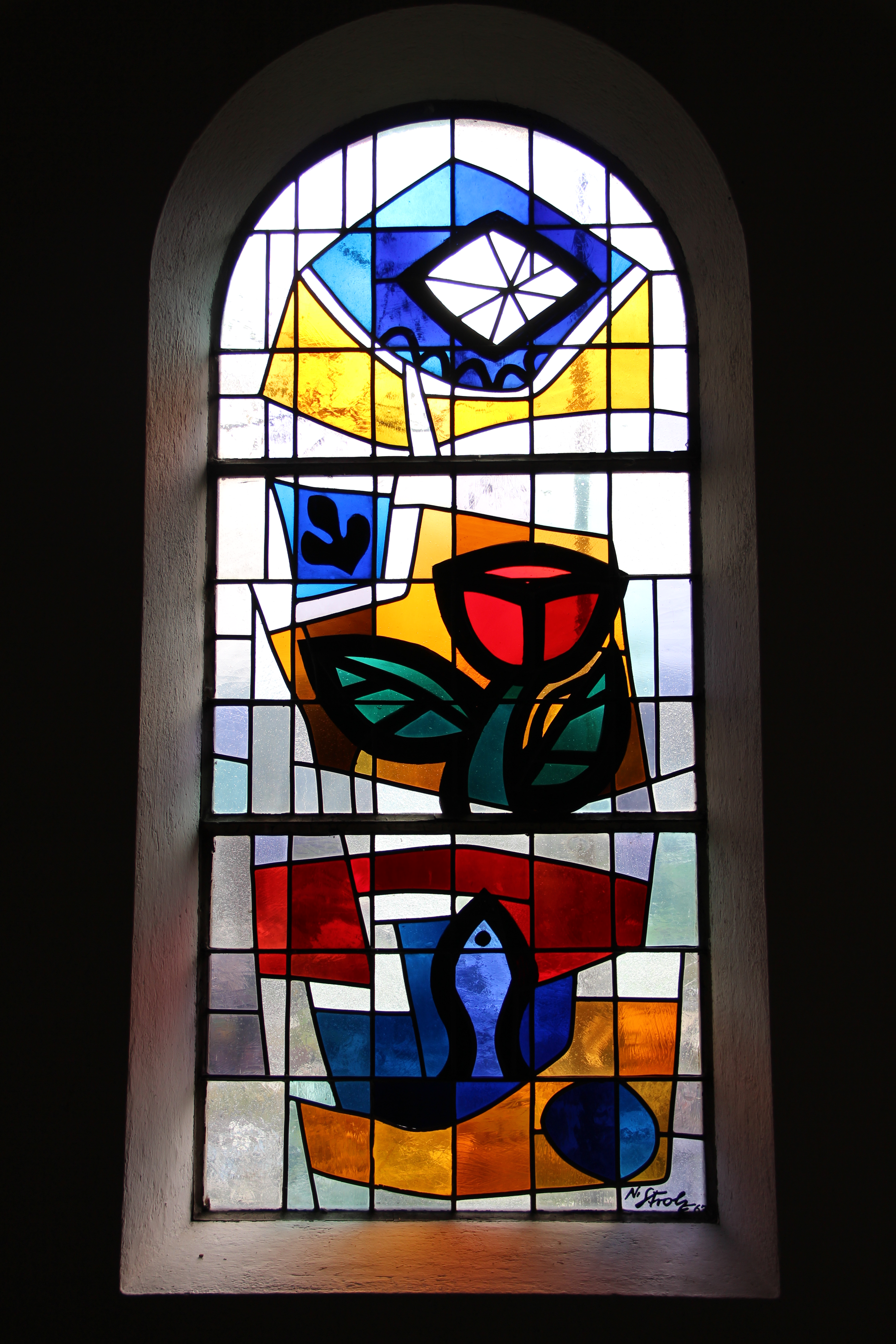 Burschl-Kapelle, auch Bruder-Klaus-Kapelle, in Roppen, Tirol